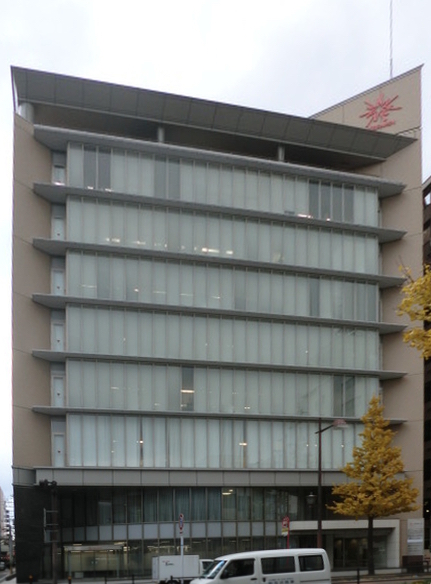 北九州の日専連べネフルです。